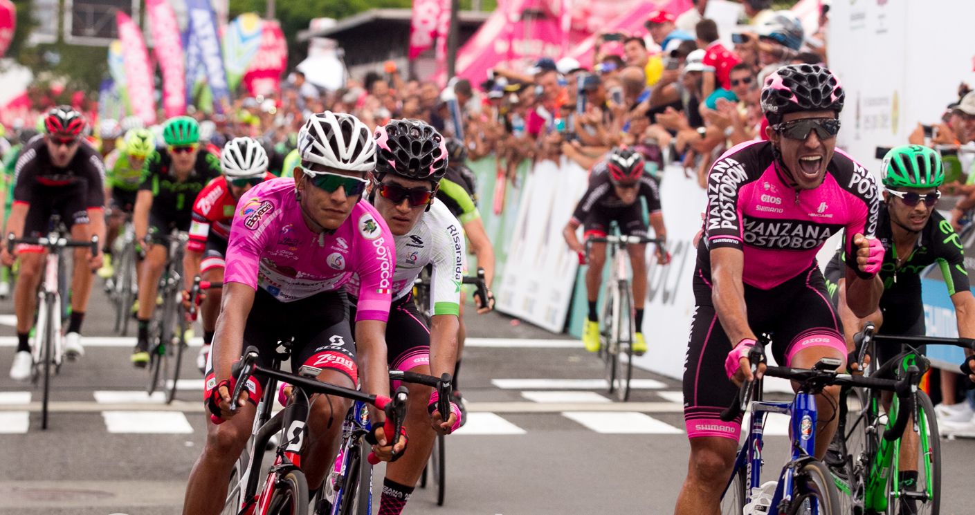 Sprint final Etapa 12 Vuelta a Colombia 2017 Domingo 13 de agosto de 2017. Circuito en Pereira 100Kms